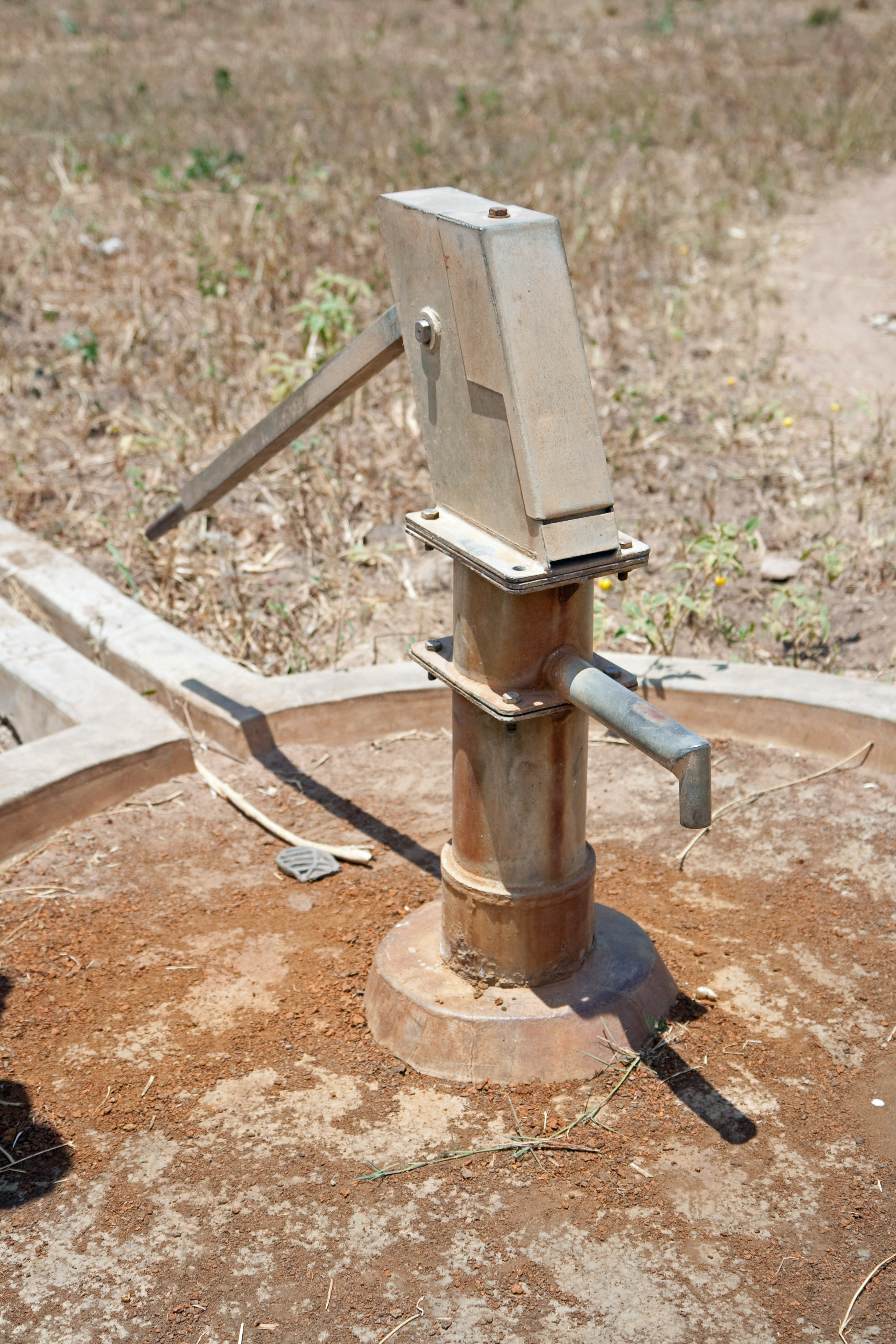 A broken India Mark II pump in rural Uganda